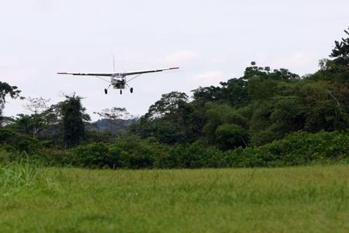 Atterissage d'un avion de la MAF à Monkoto, 2005. Missionary Aviation Fellowship. Salonga.